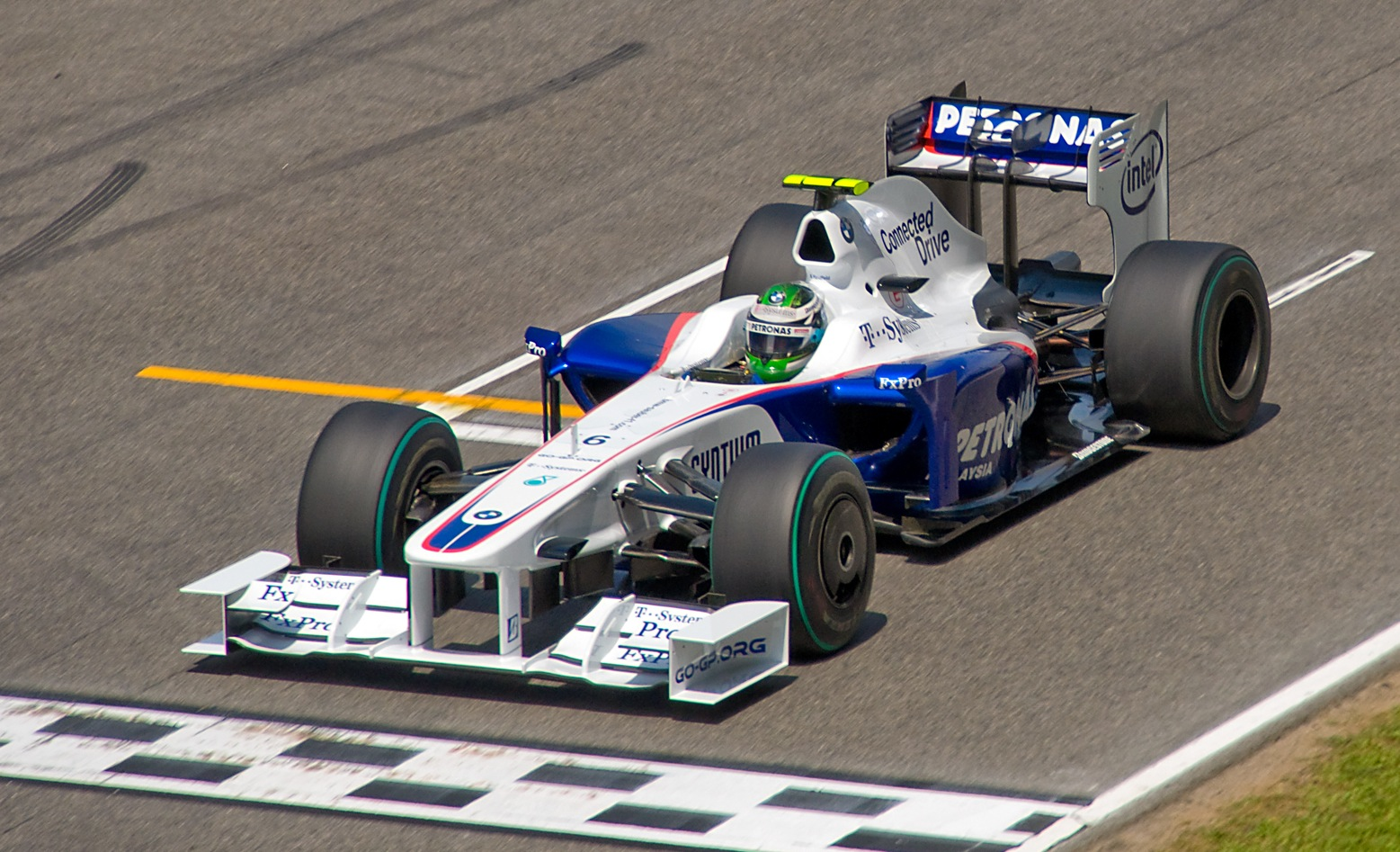 Nikon D90 + Sigma 18-200 DC OS HSM 1/1600s - F/10 - 200mm - ISO1600